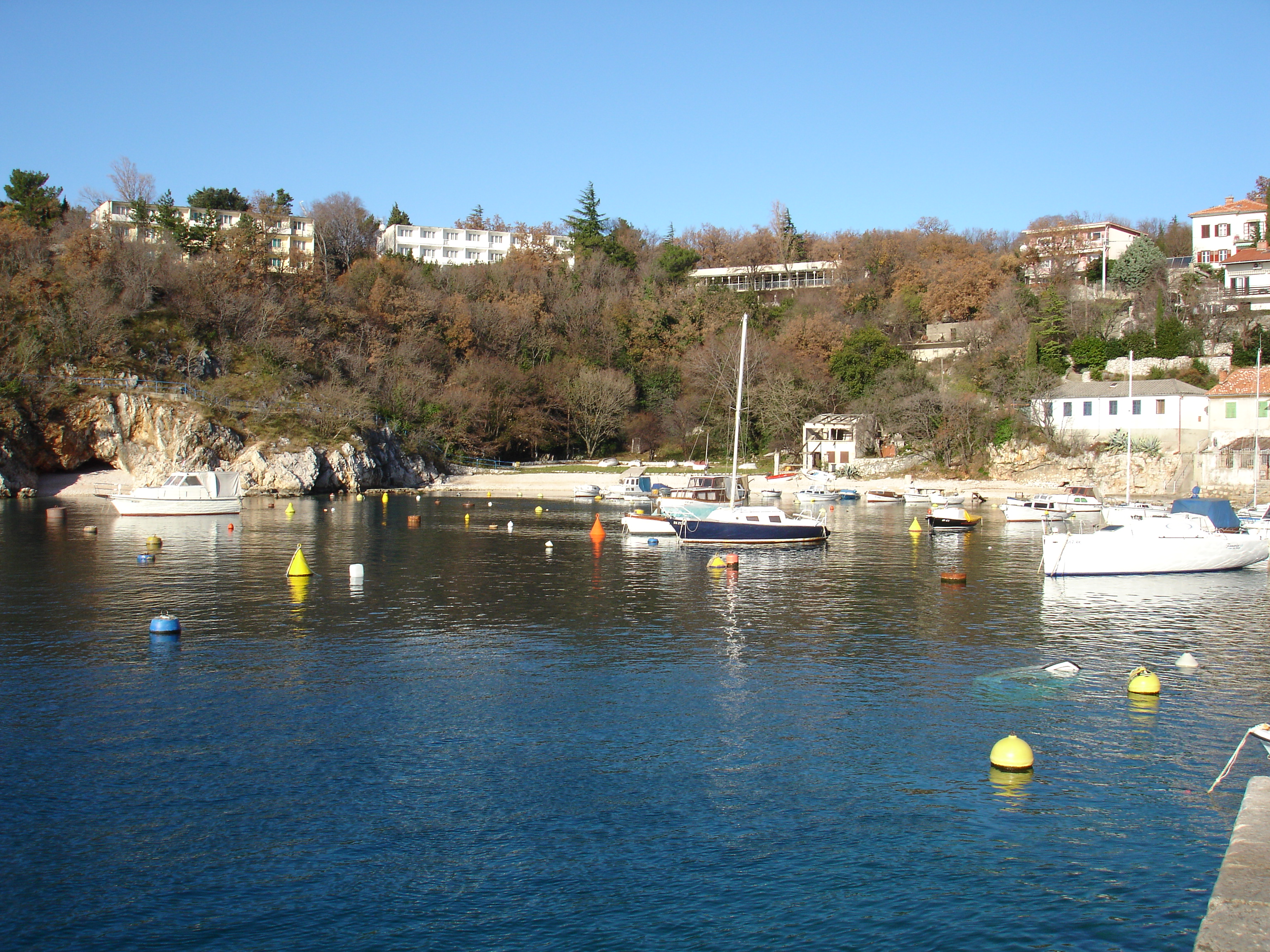 Uvala Žurkovo